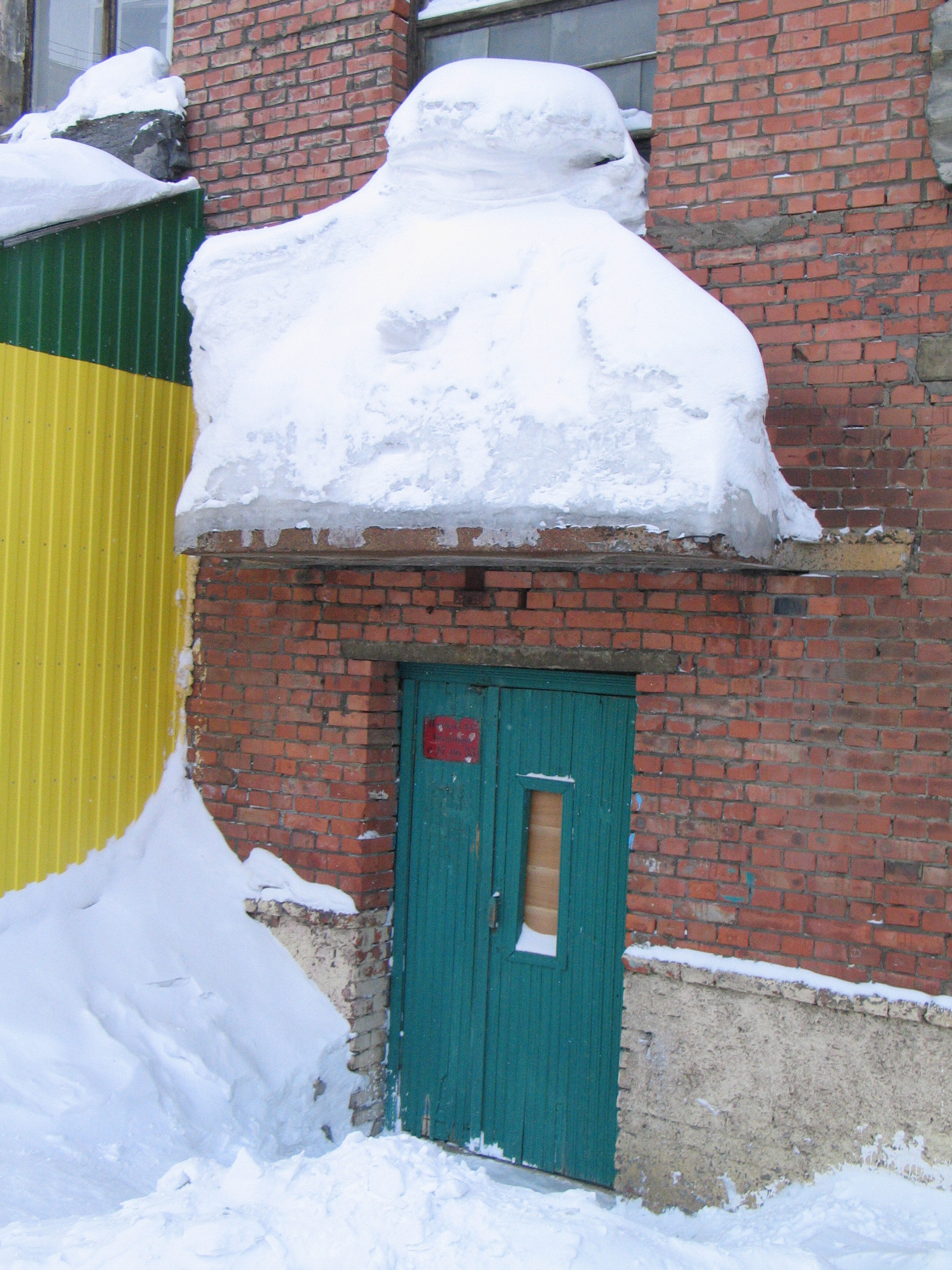 Сугроб на крыше подъезда. Норильск